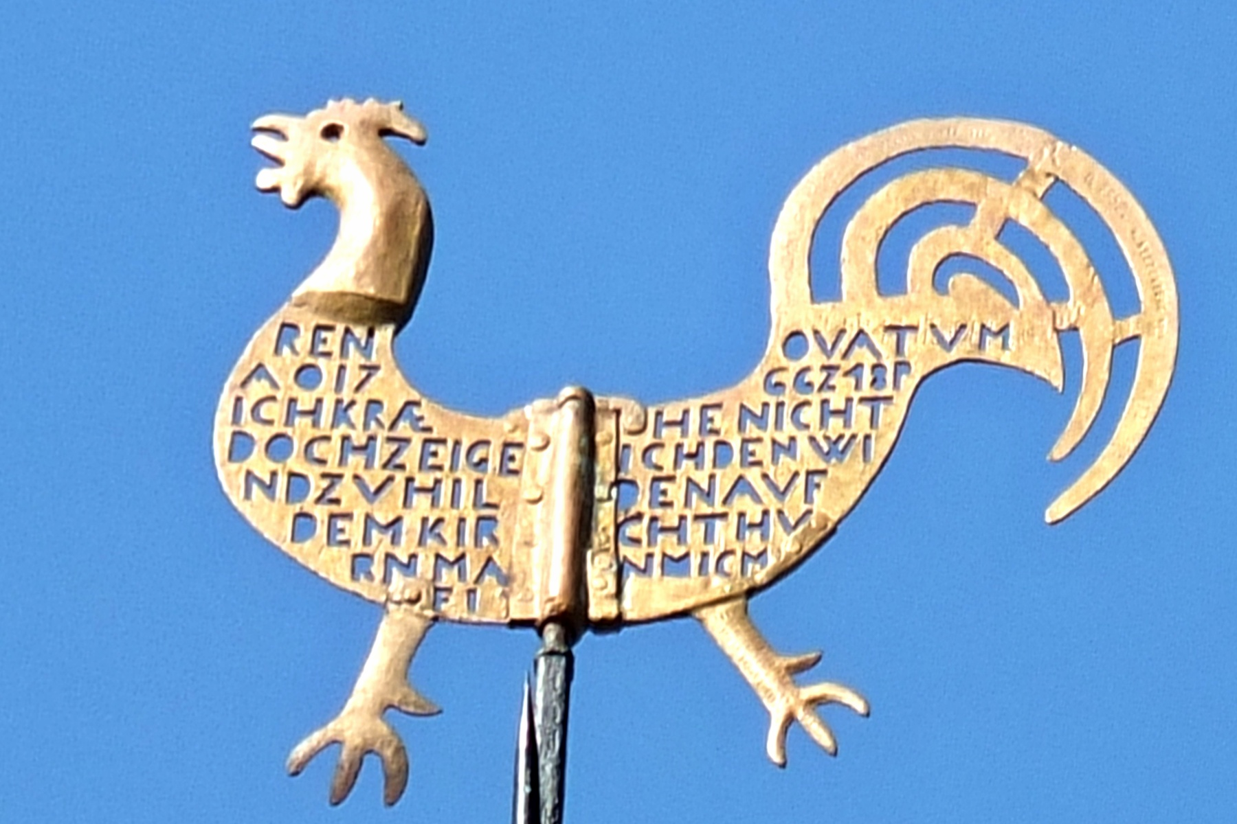 Hahn auf der Turmspitze der Reformationskirche Hilden